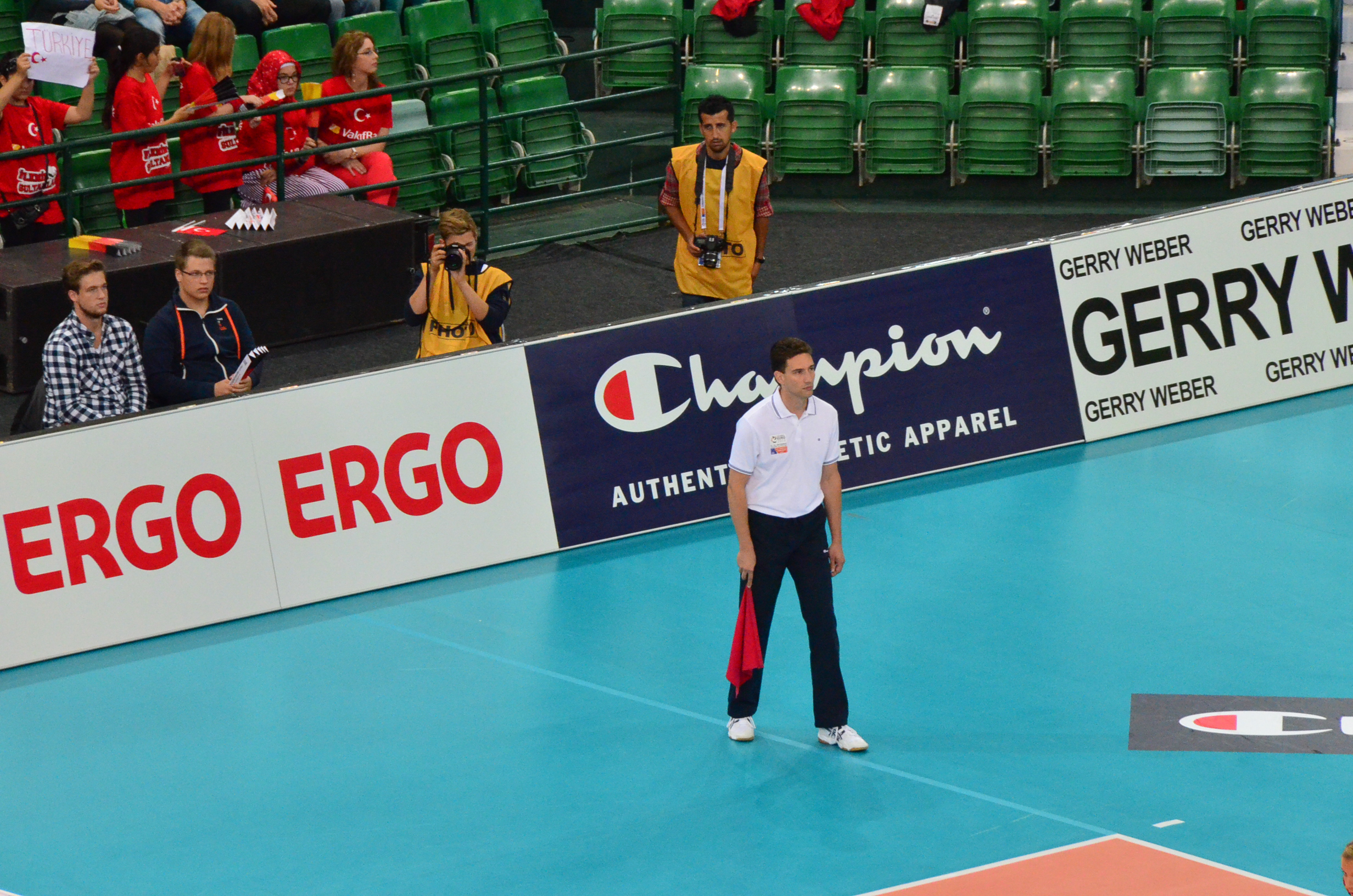 Fotos Moritz Kosinsky aus dem Jahr 2013